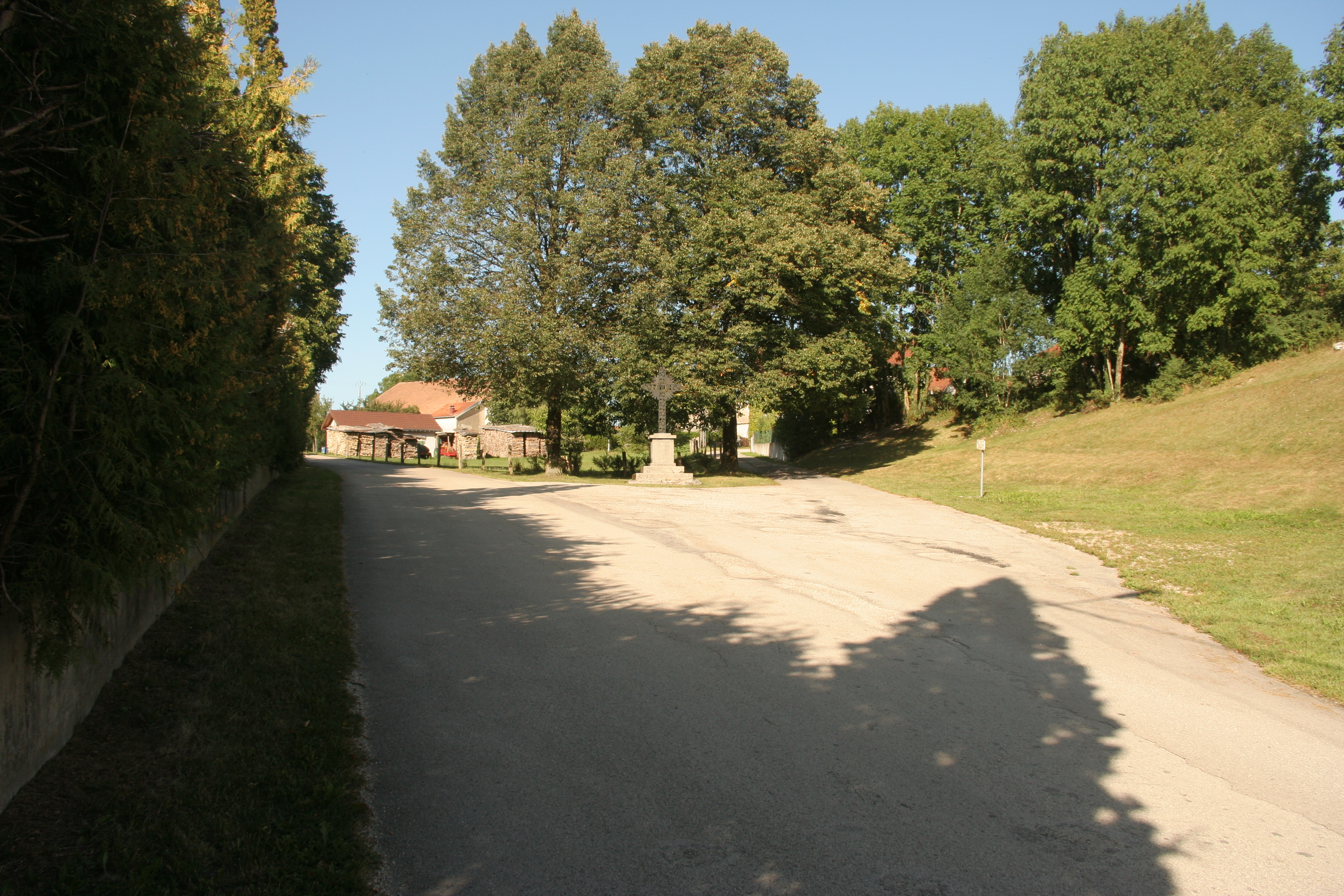 Croix située rue du Chêne Loup, à l'intersection avec la rue Progin